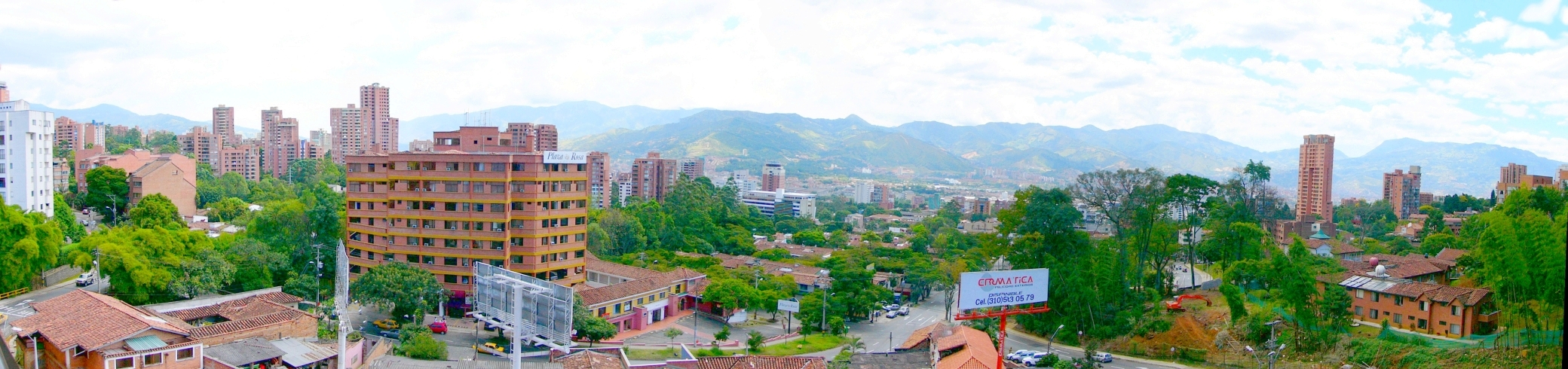 Panoramo el supra parto de orient-okcidenta strato 10a, kvartalo "El Poblado". Foto farita de Luis Guillermo Restrepo Rivas, kiun la aŭtoro liveras por publika kaj libera uzado far iu ajn homo aŭ maŝino.